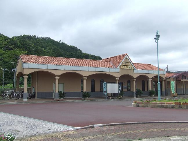 JR若狭和田駅の新駅舎